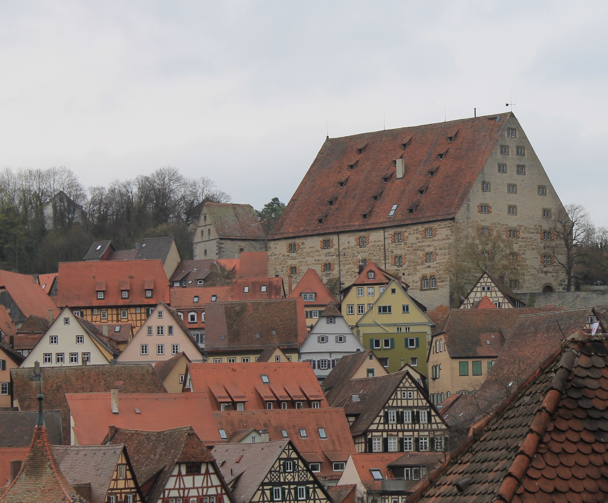 Ancien arsenal, devenu grenier de ville, aujourd'hui salle polyvalente